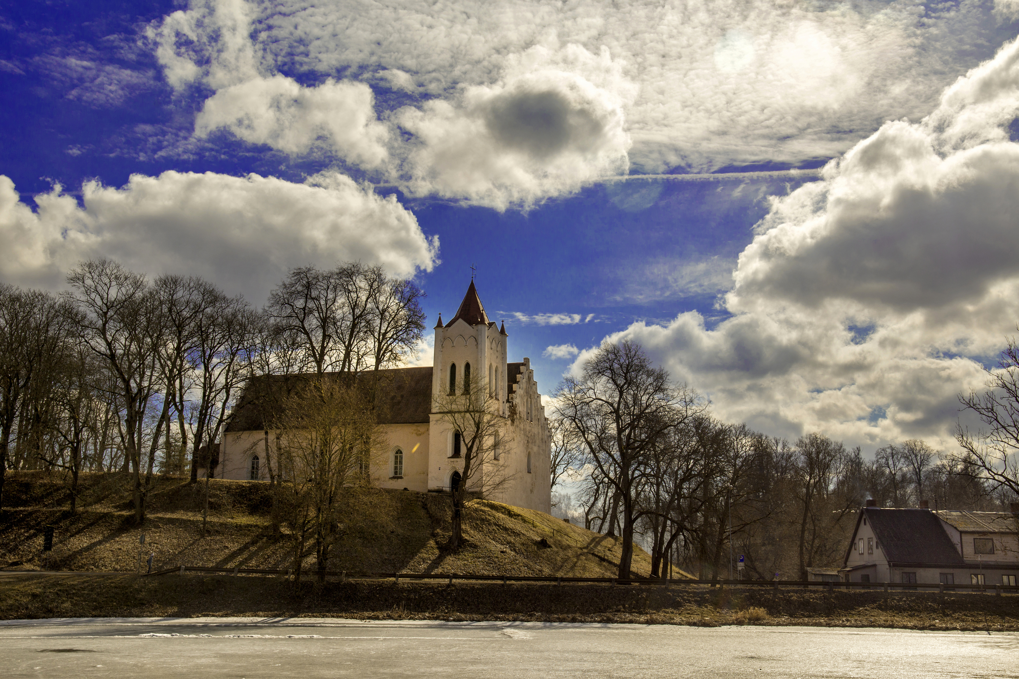 Aizputes Sv.Jāņa luterāņu baznīca, Aizpute, Liepājas iela 3